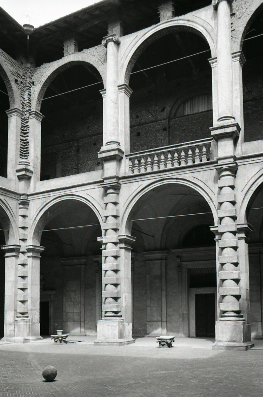 Cortile interno di Palazzo Bentivoglio, via Belle Arti 8, Bologna.